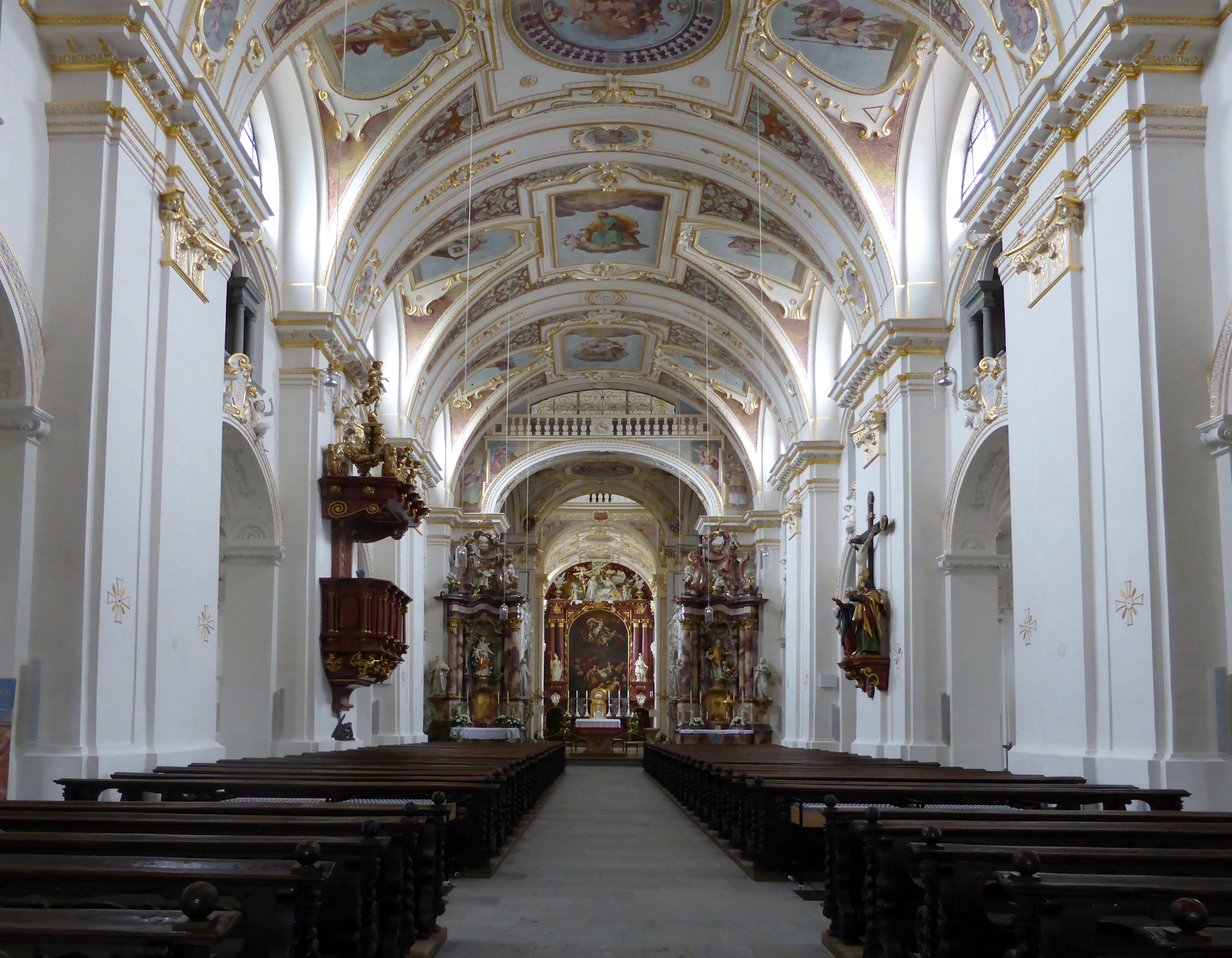 Wikipedia:Süddeutschland-Treffen im Mai 2016 in Kempten im Allgäu. Basilika St. Lorenz, Langhaus.